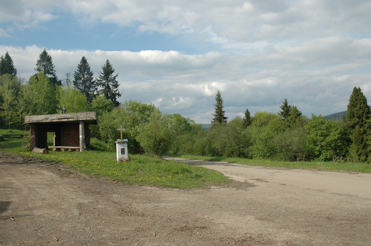 Veretskyi Pass (Ukraine)